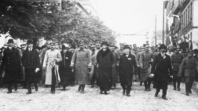 Naczelnik Państwa Józef Piłsudski na ul. Tumskiej w Gnieźnie, 27 października 1919 r. Pierwszy z lewej (na pierwszym planie) Stanisław Wojciechowski. Czwarty z lewej (na pierwszym planie) Józef Dowbor-Muśnicki (w mundurze).